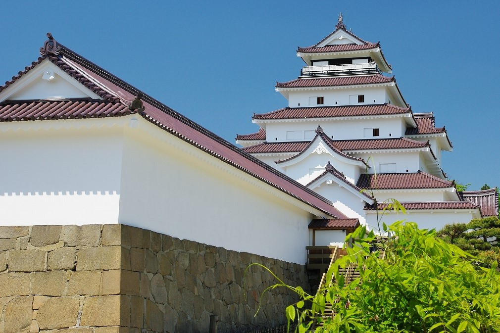 赤瓦の若松城